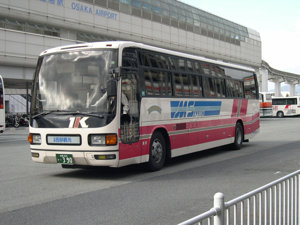 大阪空港にて 2004-11-13撮影